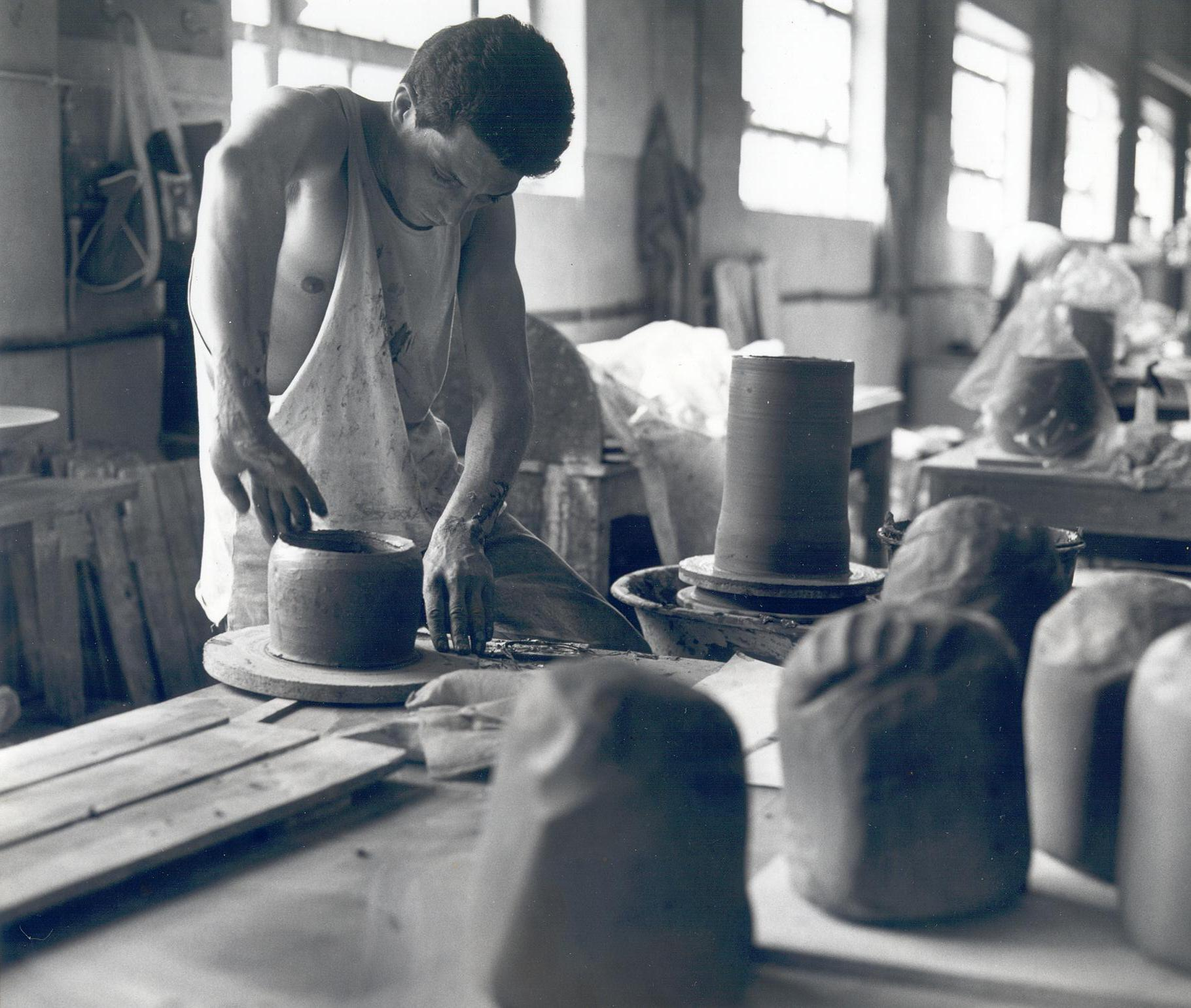 The portuguese plastic artist João Carqueijeiro in Alcobaça (Portugal)